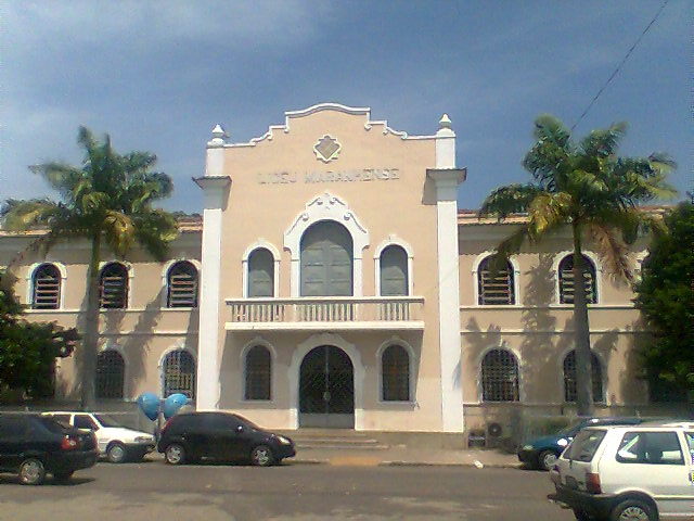 Sede do colégio Liceu Maranhense em 2008.